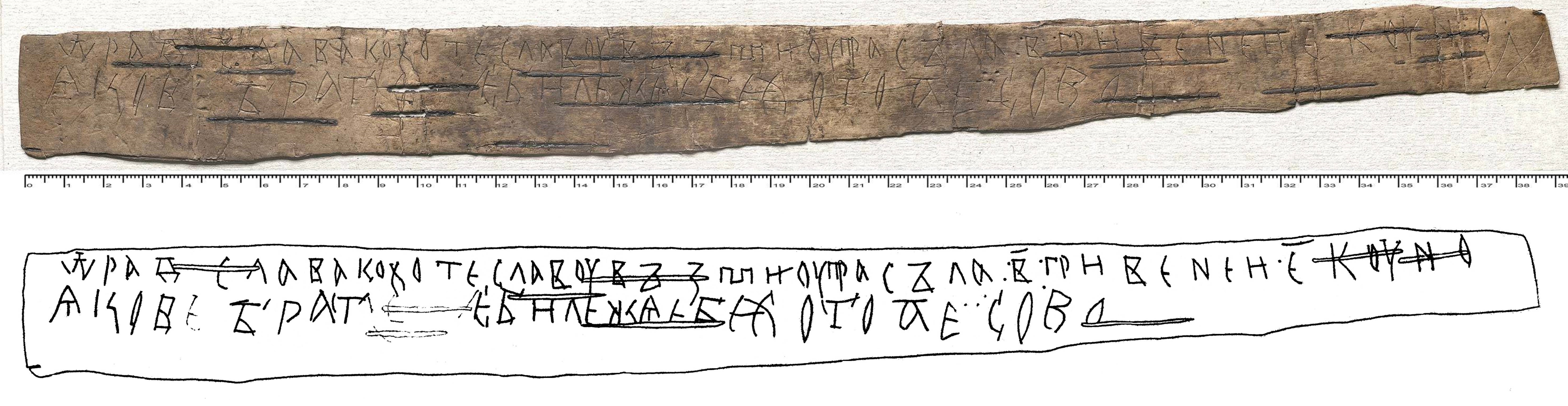 Берестяная грамота из Старой Руссы № 33, содержит древнейший русский образец обсценной лексики